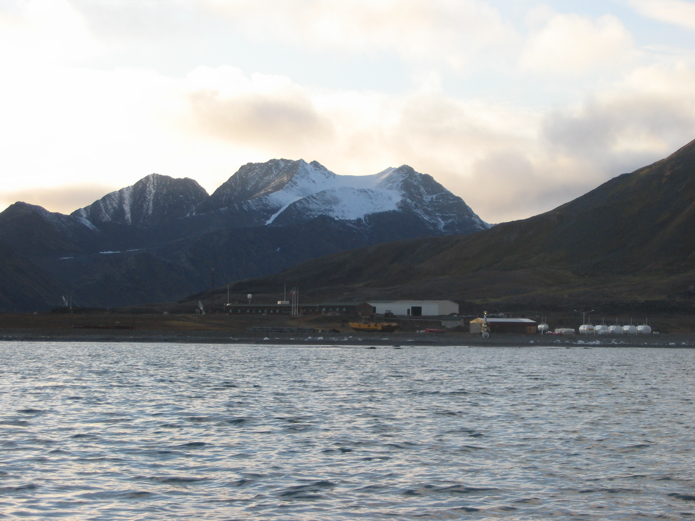 Polish Polar Station in Isbjørnhamna, Hornsund, Svalbard